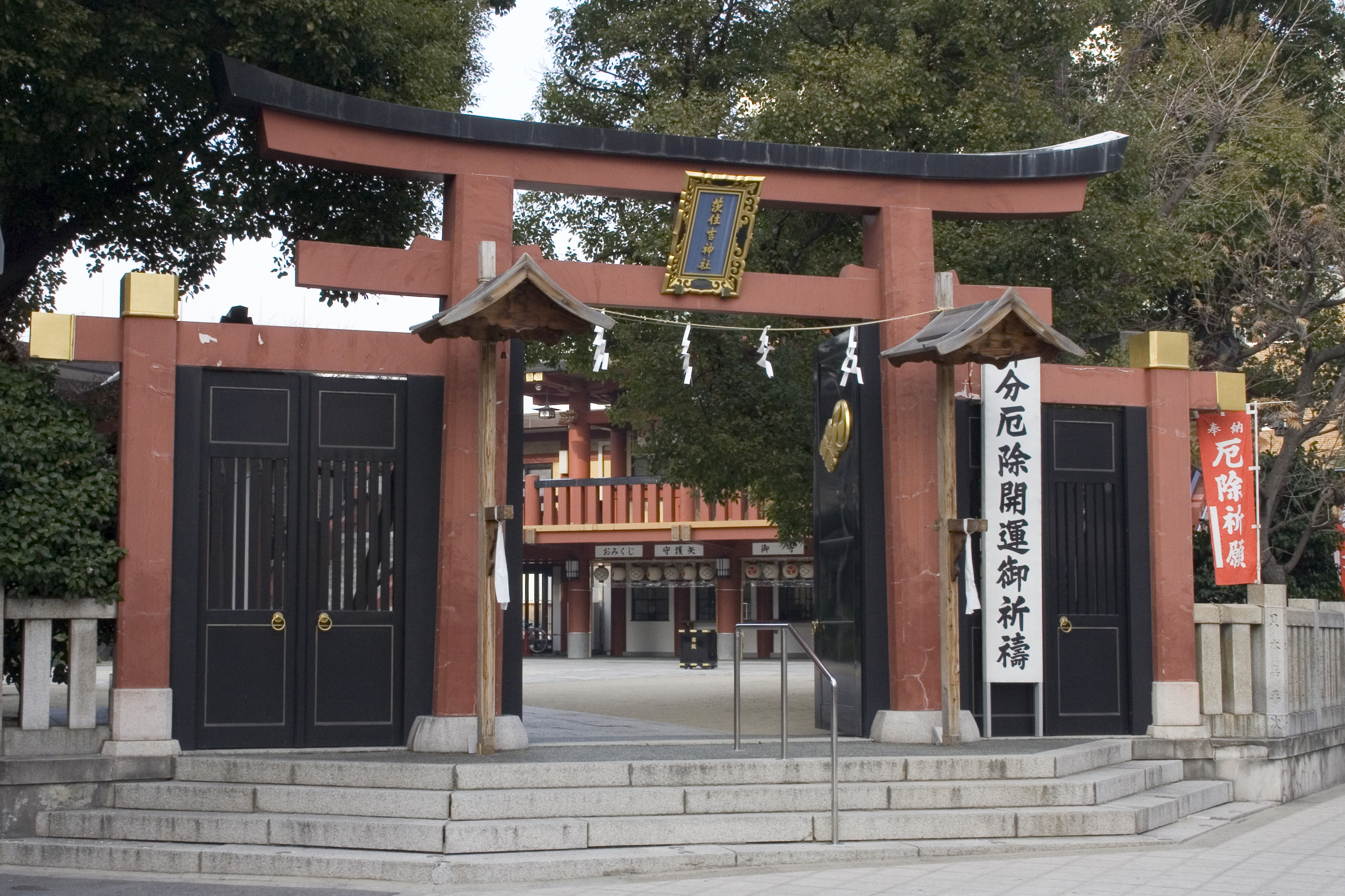 =茨住吉神社（大阪市西区）